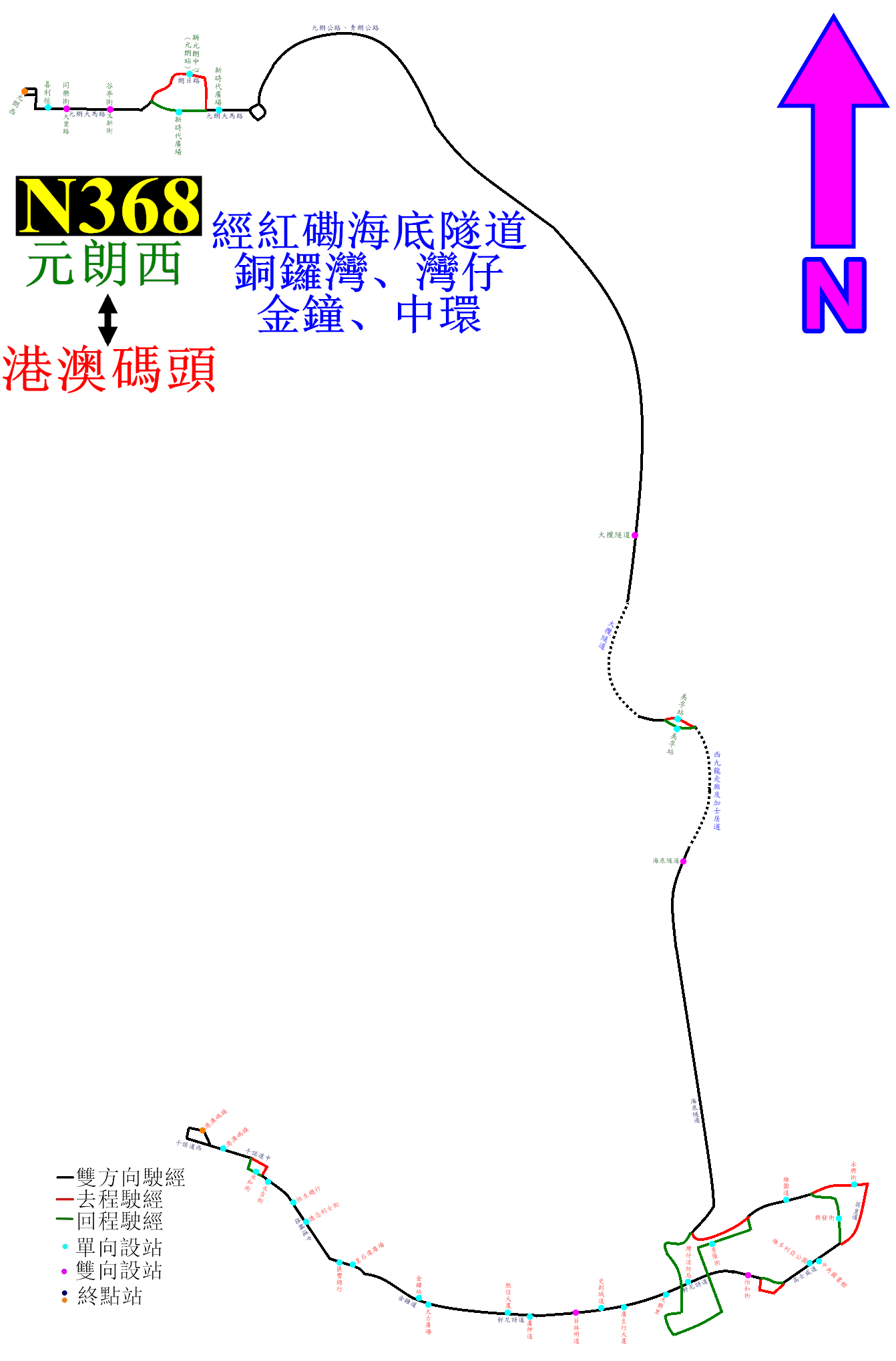 中文（香港）: 過海隧巴N368線的走線圖